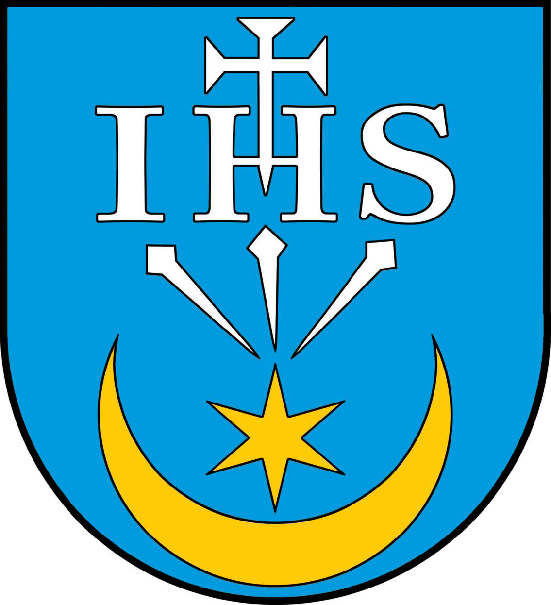 Herb gminy Pawłosiów